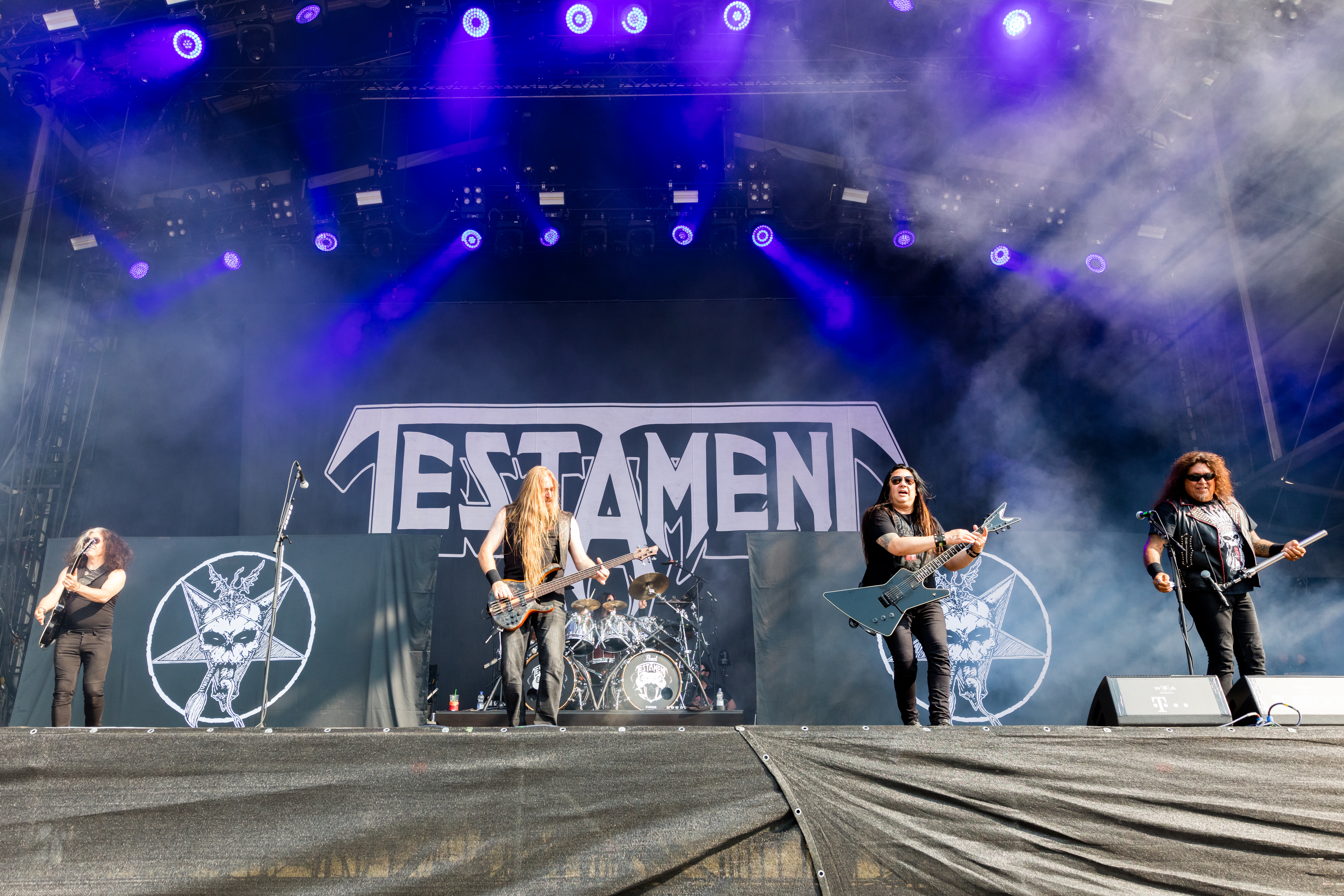 Testament during Wacken Open Air at The Holy Wacken Land, Wacken, Schleswig-Holstein, Germany on 2019-08-01, Photo: Sven Mandel